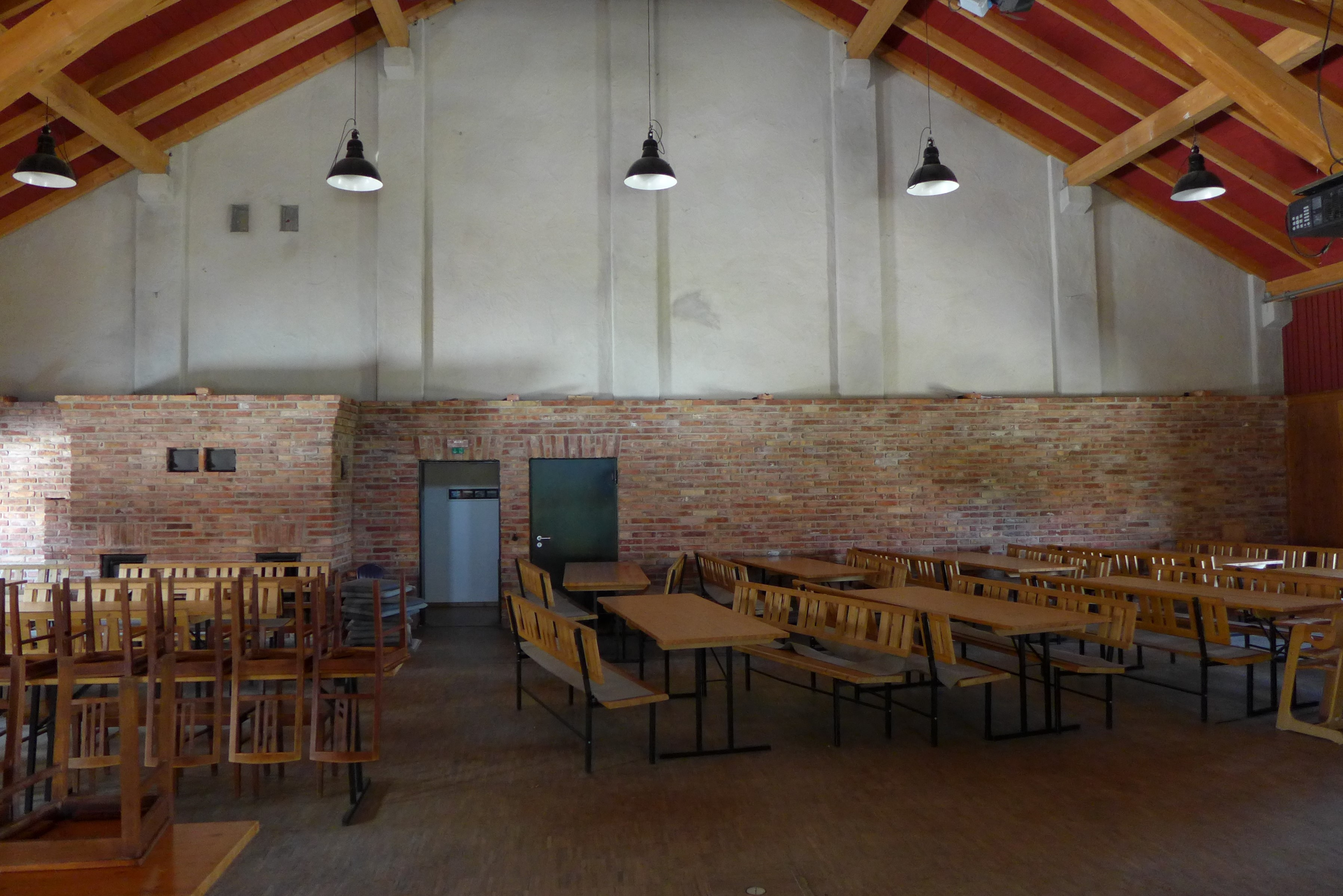 Söllhuben, Gasthaus Hirzinger, Festsaal, Für die Sendung "Wirtshausmusikanten beim Hirzinger" wird die Halle jeweils dekoriert